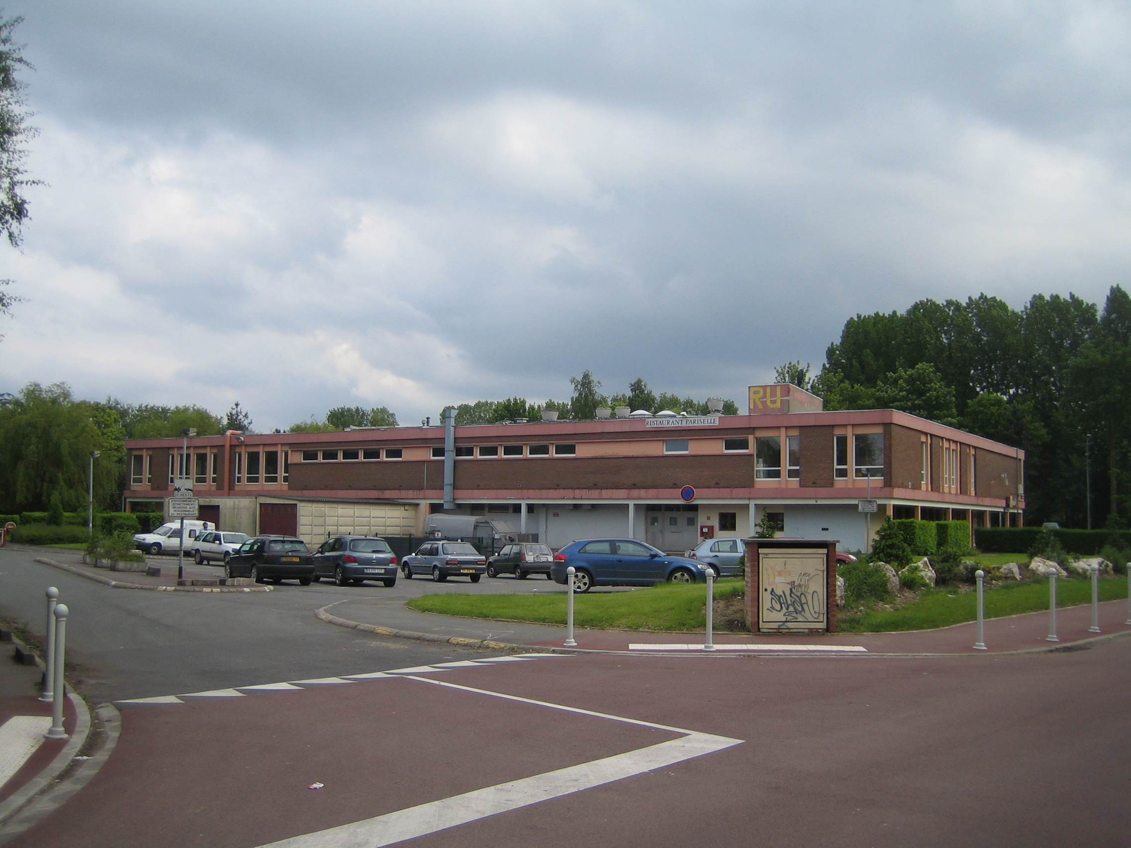 Restaurant Universitaire Henri Pariselle, Université Lille I, Villeneuve d'Ascq